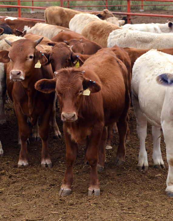 La actividad principal de el municipio la ganadería, es una de las actividades mas importantes para nuestra región.